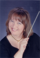 Carolyn Waters Broe